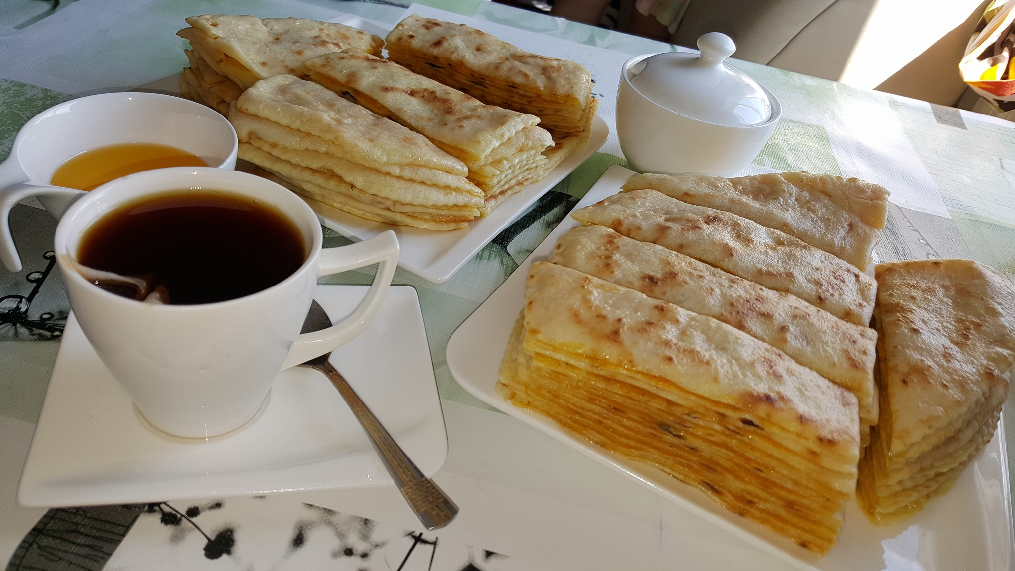 чеченское национальное блюдо, кукурузные или пшеничные лепешки с тыквой и сливочным или топленым маслом, чуду (пирог) с тыквенной начинкой, порезанные на несколько частей, на тонком тесте. This file, which was originally posted to was reviewed on 7 September 2016 by the administrator or reviewer INeverCry, who confirmed that it was available there under the stated license on that date.